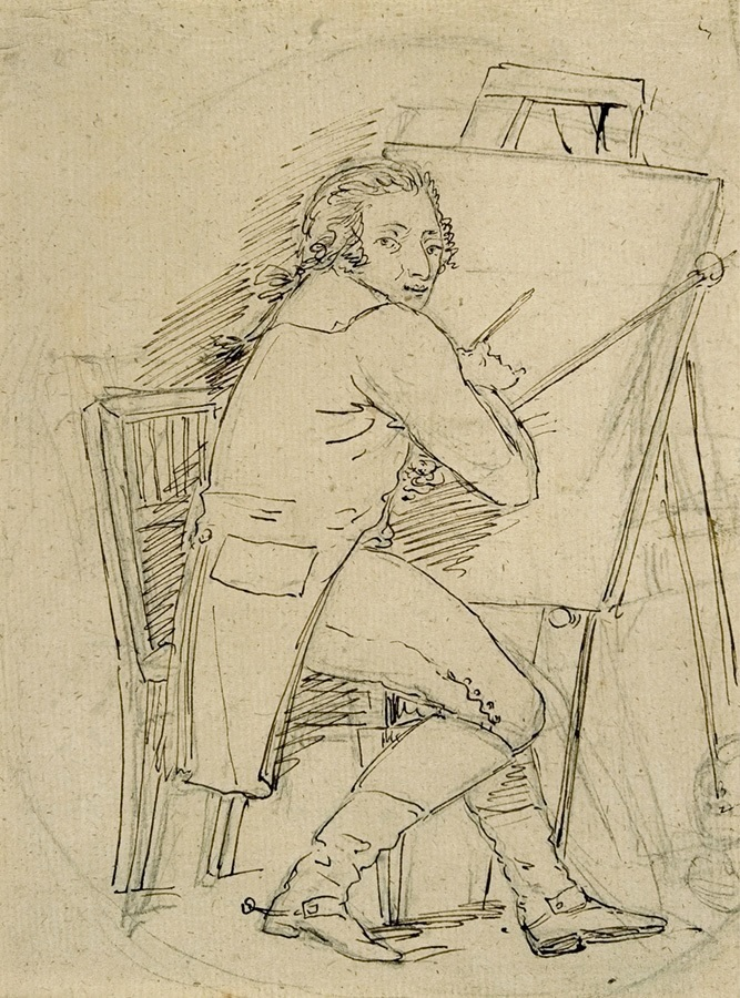 Carl Daniel David Friedrich Bach (1765–1829), 1805_Selbstporträt.jpg